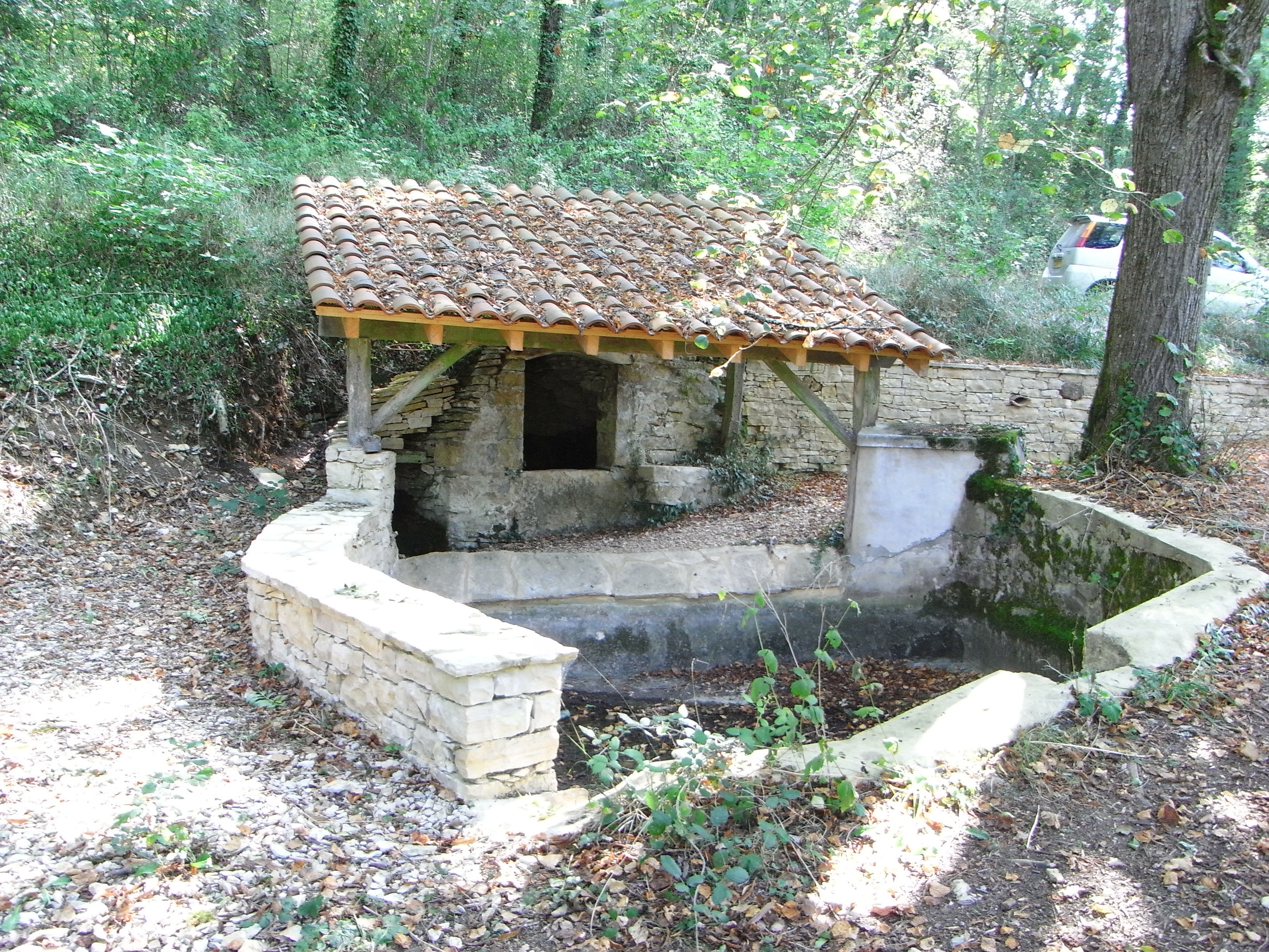 Lavoir avec source collinaire des Escalétoux à Saint-Clair (Lot, France).